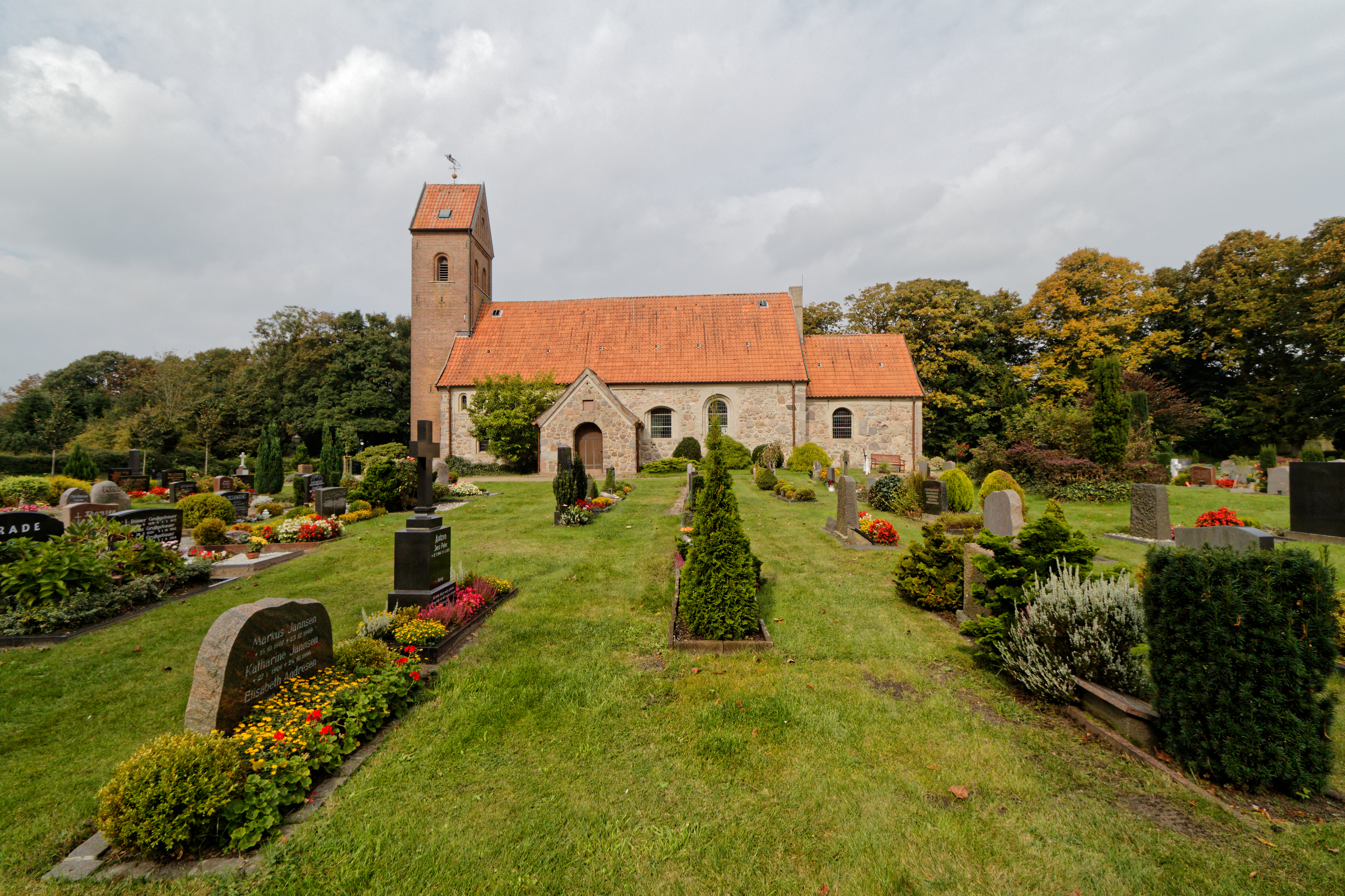 Nordhackstedt, Kirche St.Jürgen; Kirchhof